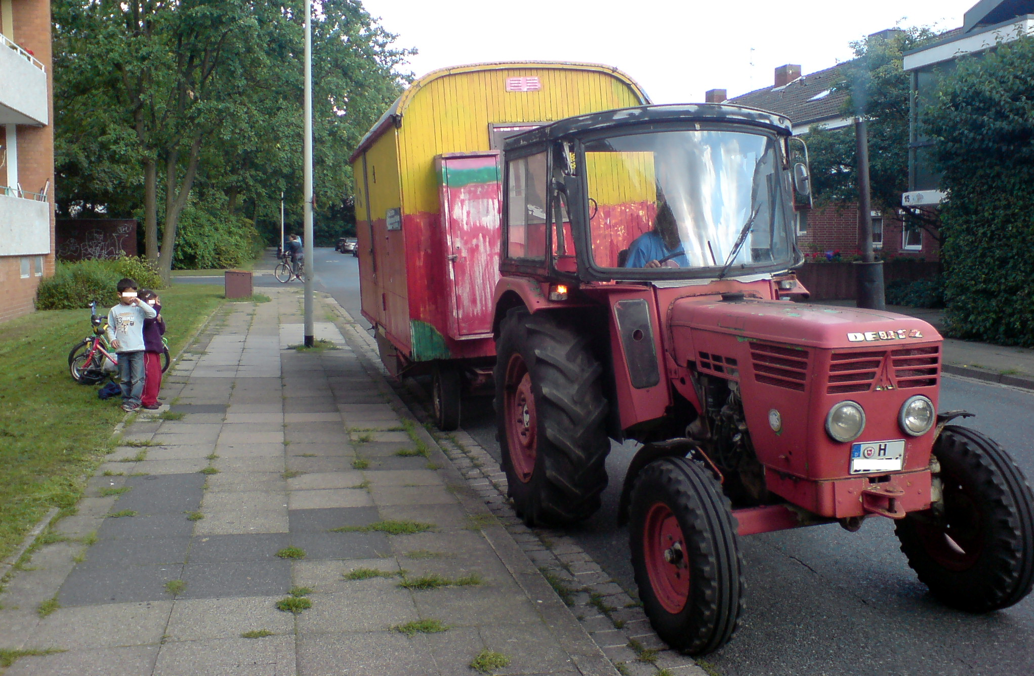 Mobiler Spielwagen für Kinder, gezogen von einem Trecker der Marke Deutz, vom Verband Christlicher Pfadfinder und Pfadfinderinnen, Bezirk Hannover.